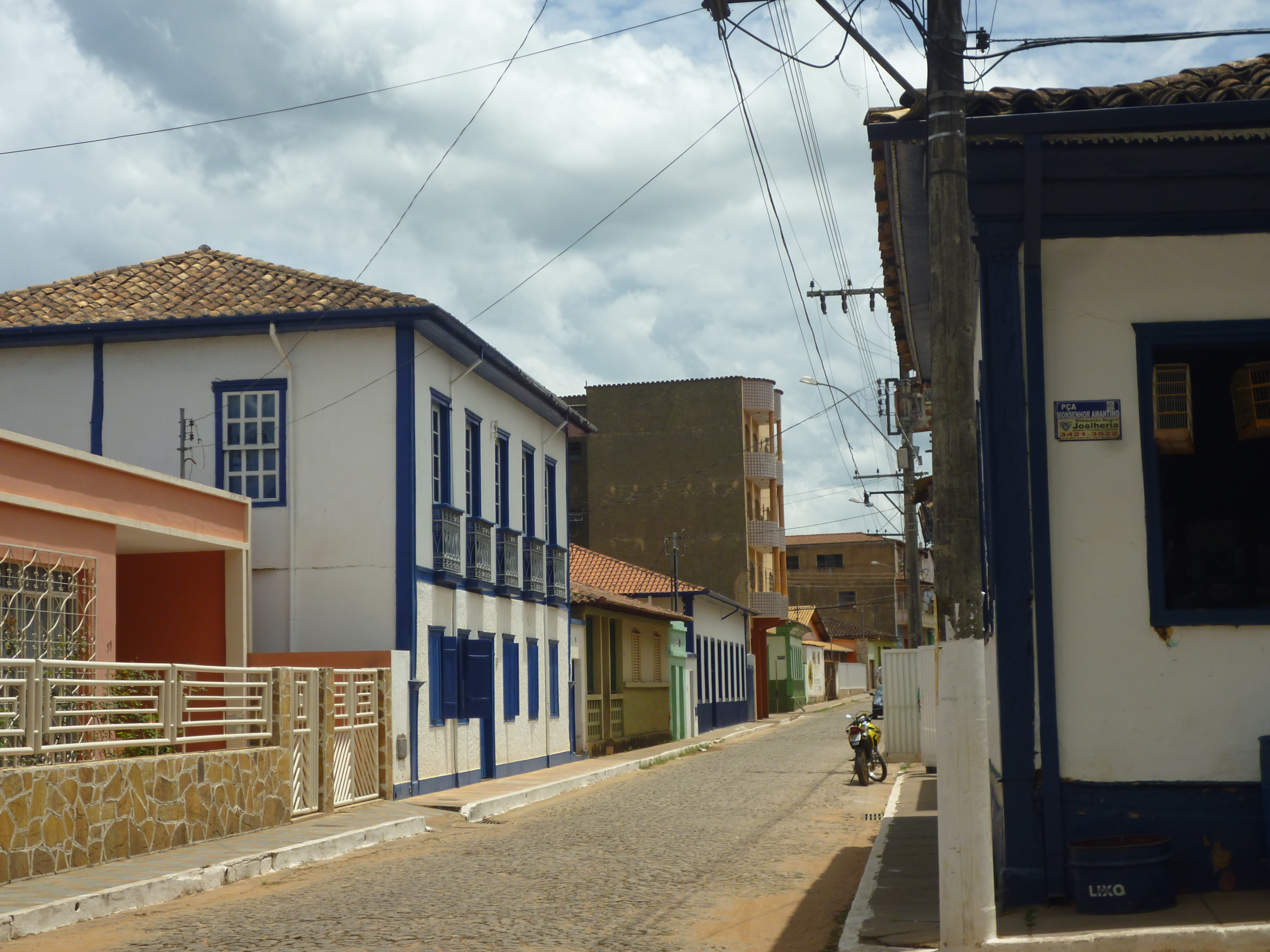 Sabinópolis MG Brasil - Vista parcial